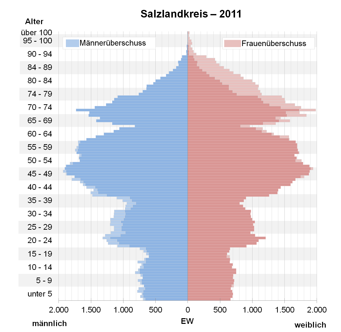 Bevölkerungspyramide des Salzlandkreises nach Zensus 2011.